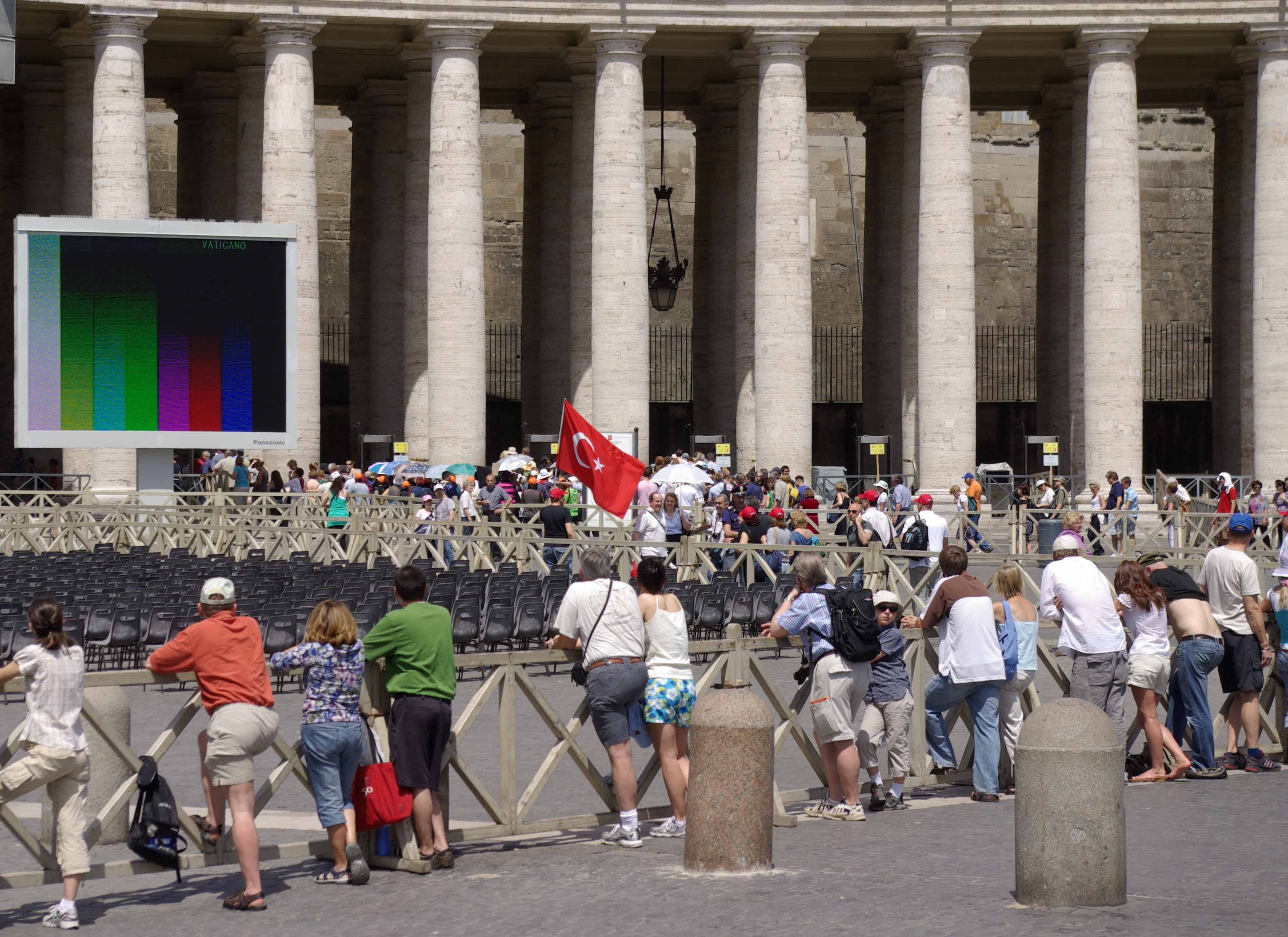 Römisch-katholische Türken auf dem Petersplatz in Rom